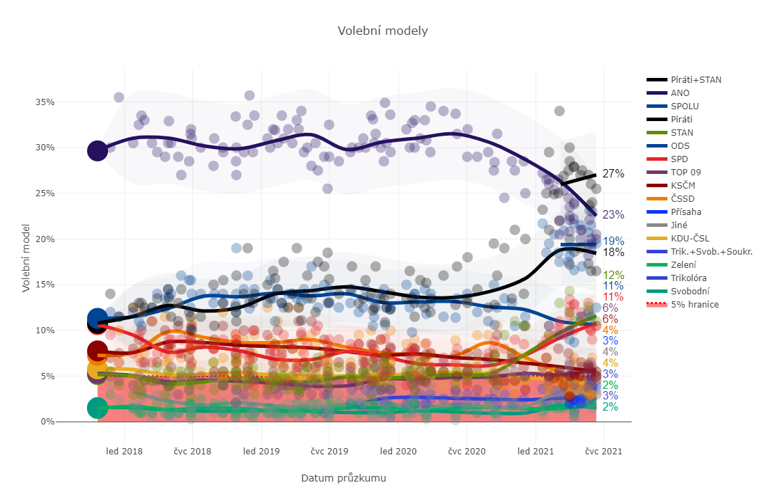 Graf volebních modelů pro příští volby do Sněmovny. Začíná od voleb 2017.